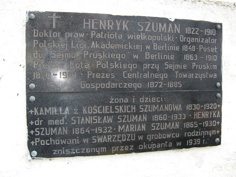 Tablica pamiątkowa rodziny Szuman na cmentarzu przy kościele św. Marcina w Swarzędzu